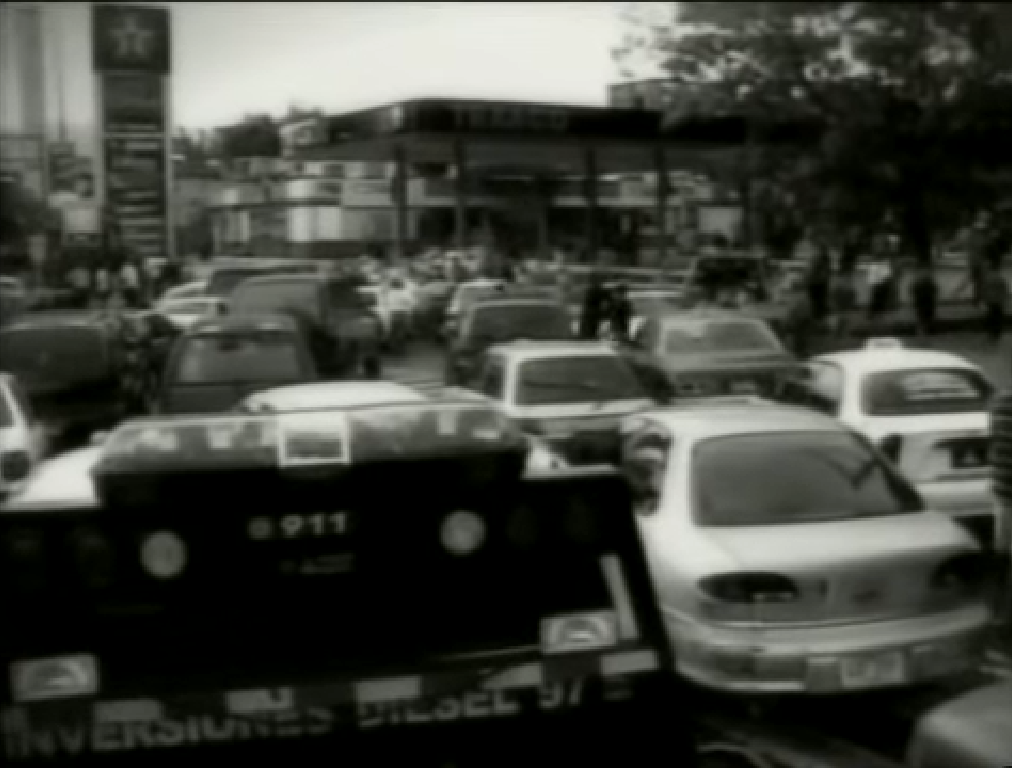 Colas de gasolina durante el paro petroleo de 2002-2003